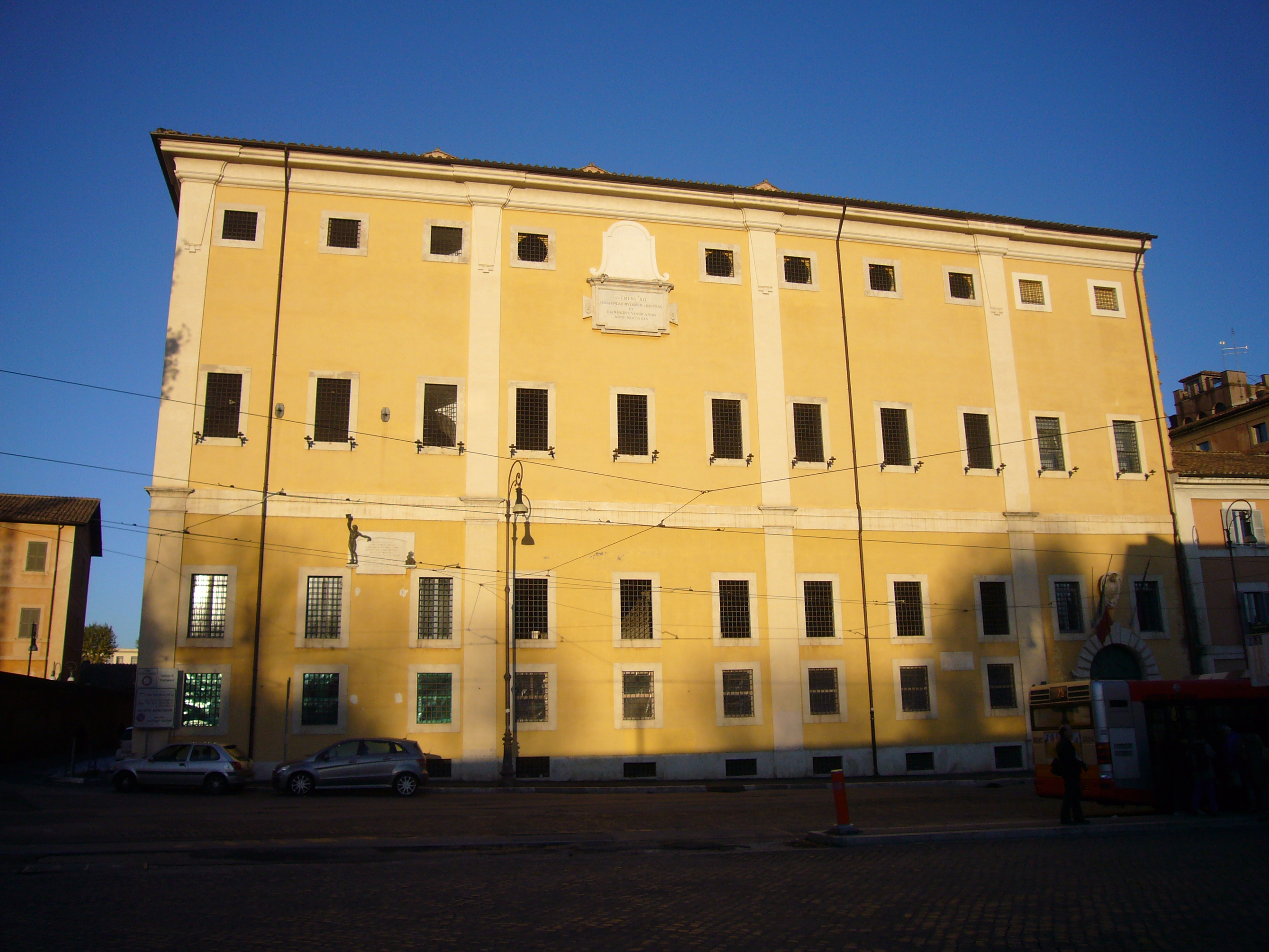 Roma, Istituto San Michele: carcere delle donne a piazza di Porta Portese